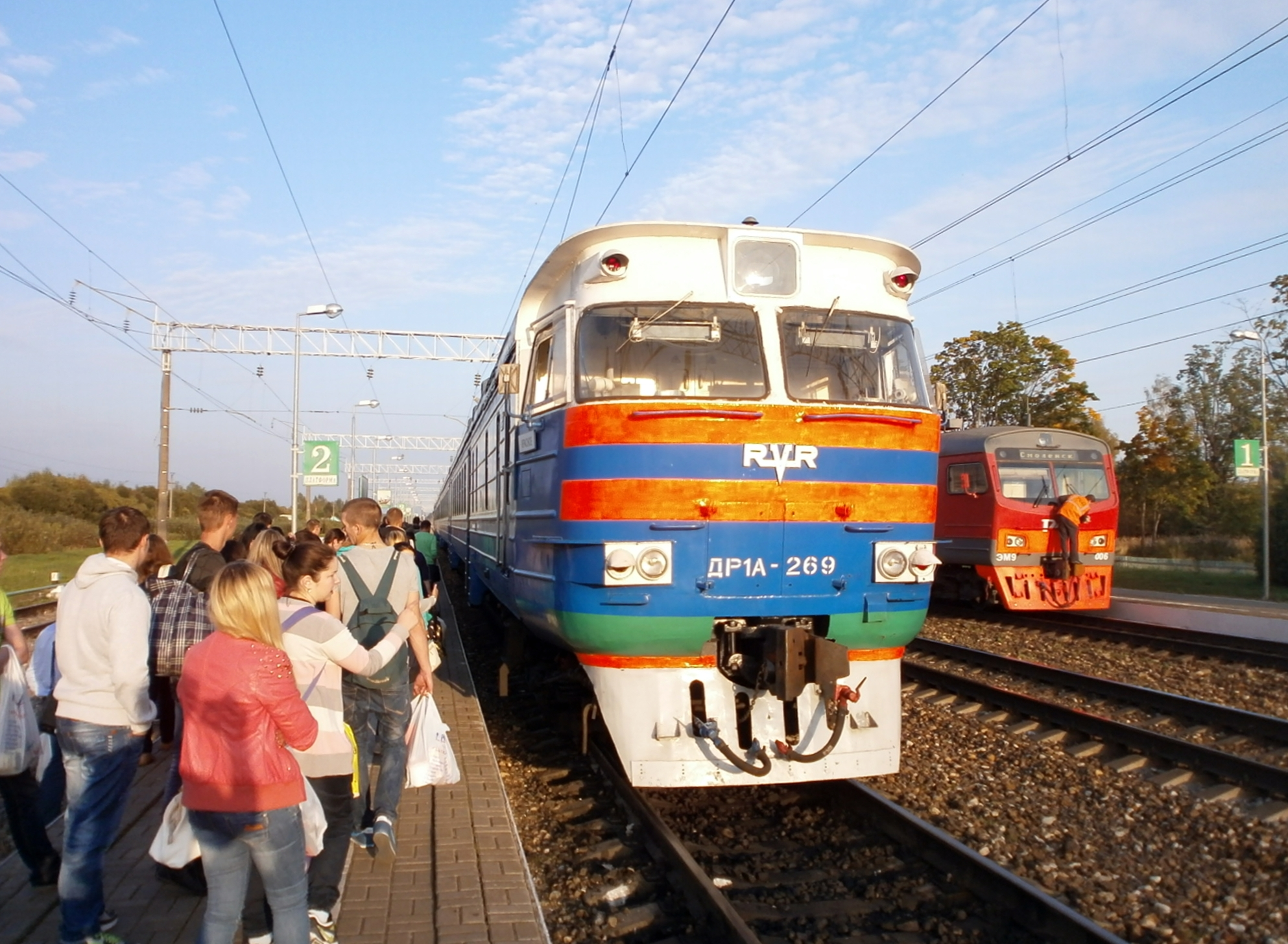 Дизель-поезд ДР1А-269 и электропоезд ЭМ9-006 (вдали) на станции Красное